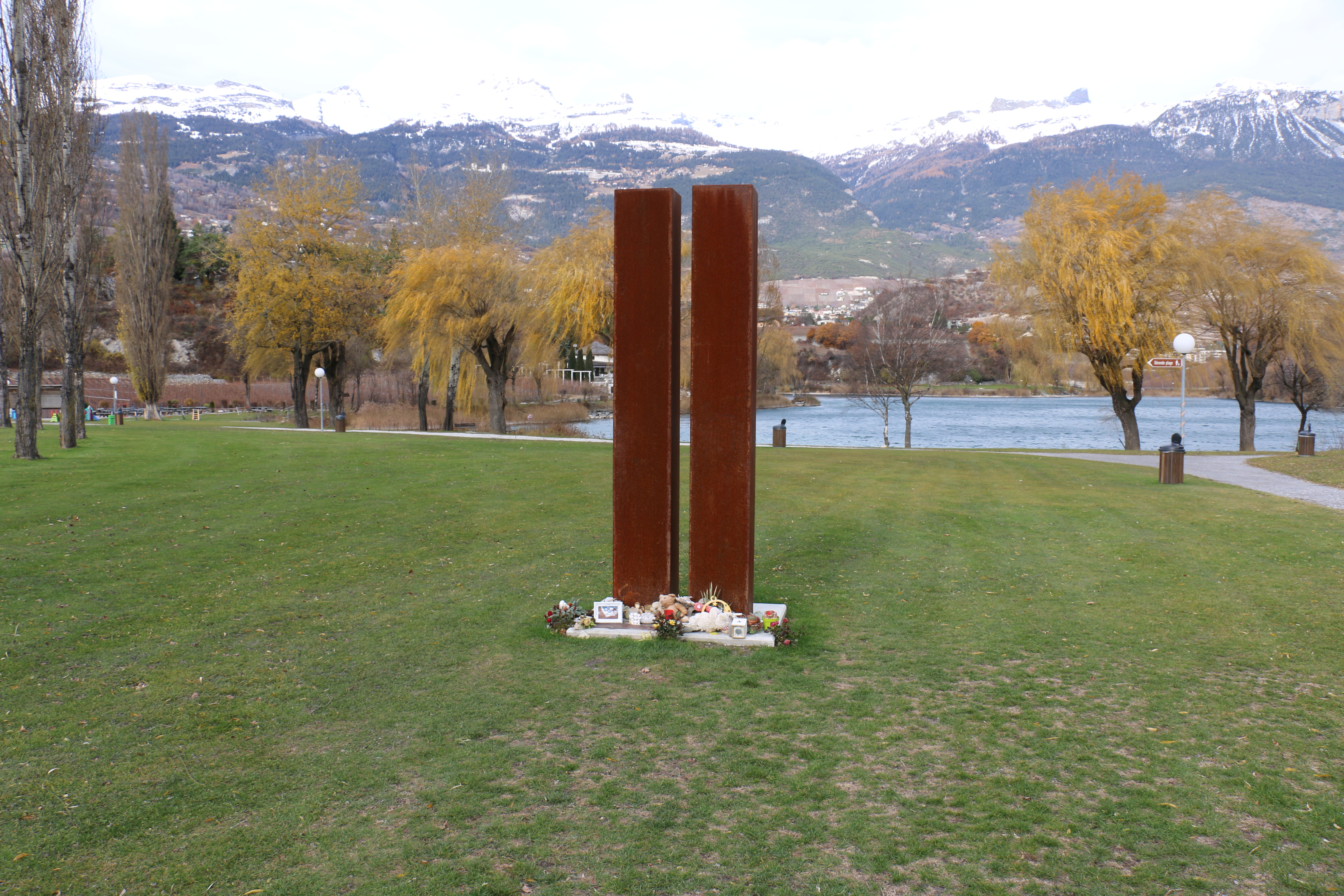 Un monument en mémoire des 28 victimes, dont 22 enfants, décédés dans l'accident de car de mars 2012 en Valais.